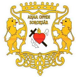 coat Budapest 23 district